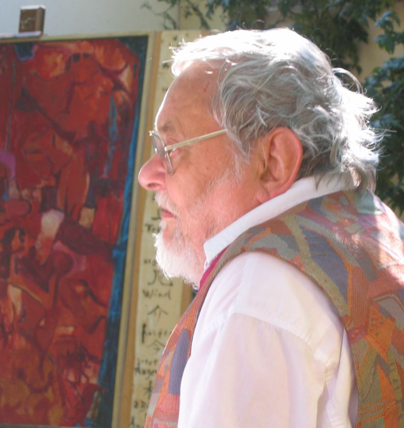 Der Kunstmaler Paul Heinrich Nodnagel bei einem Vortarg über eines seiner Werke